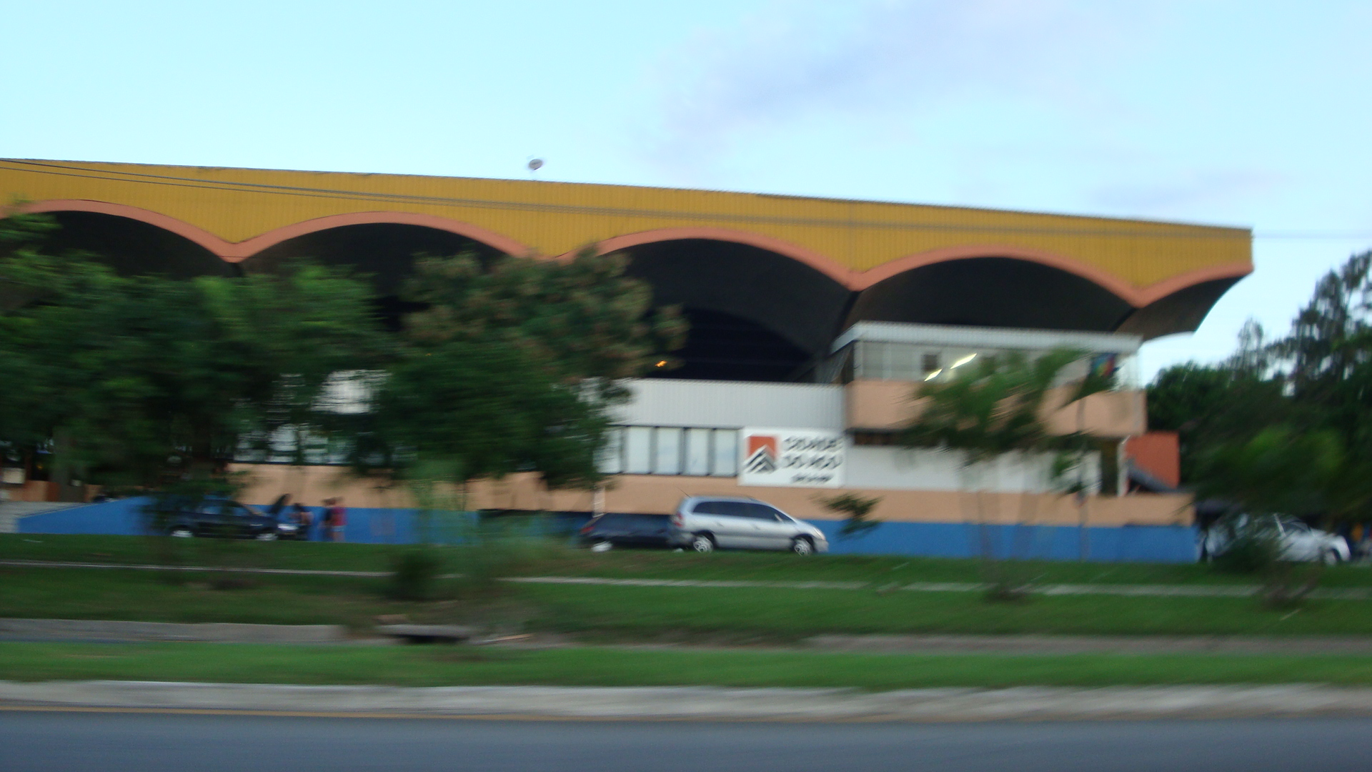 Rodoviaria Volta Redonda